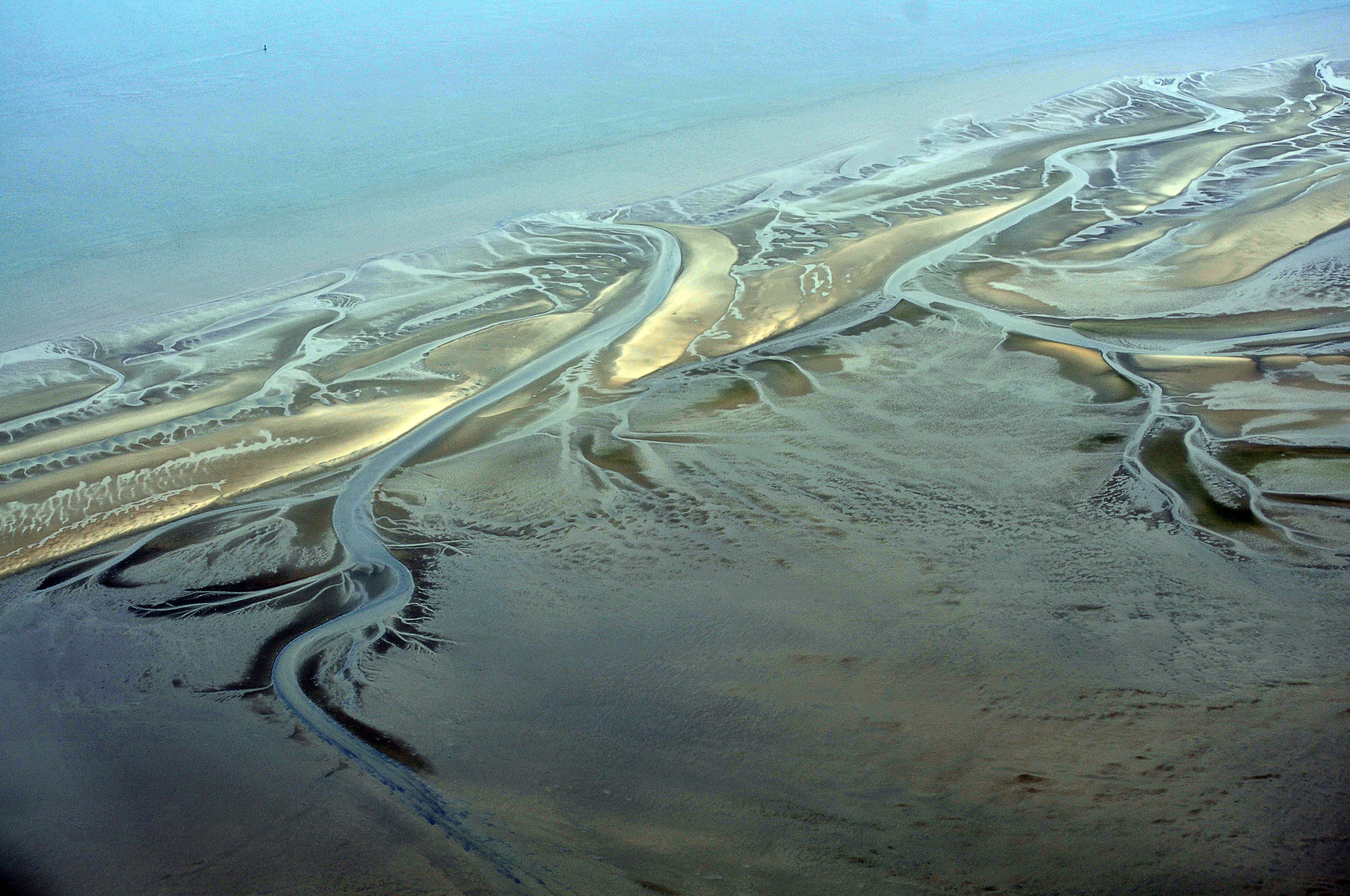 Fotoflug Nordsee, Priele im Watt vor Scharhörn